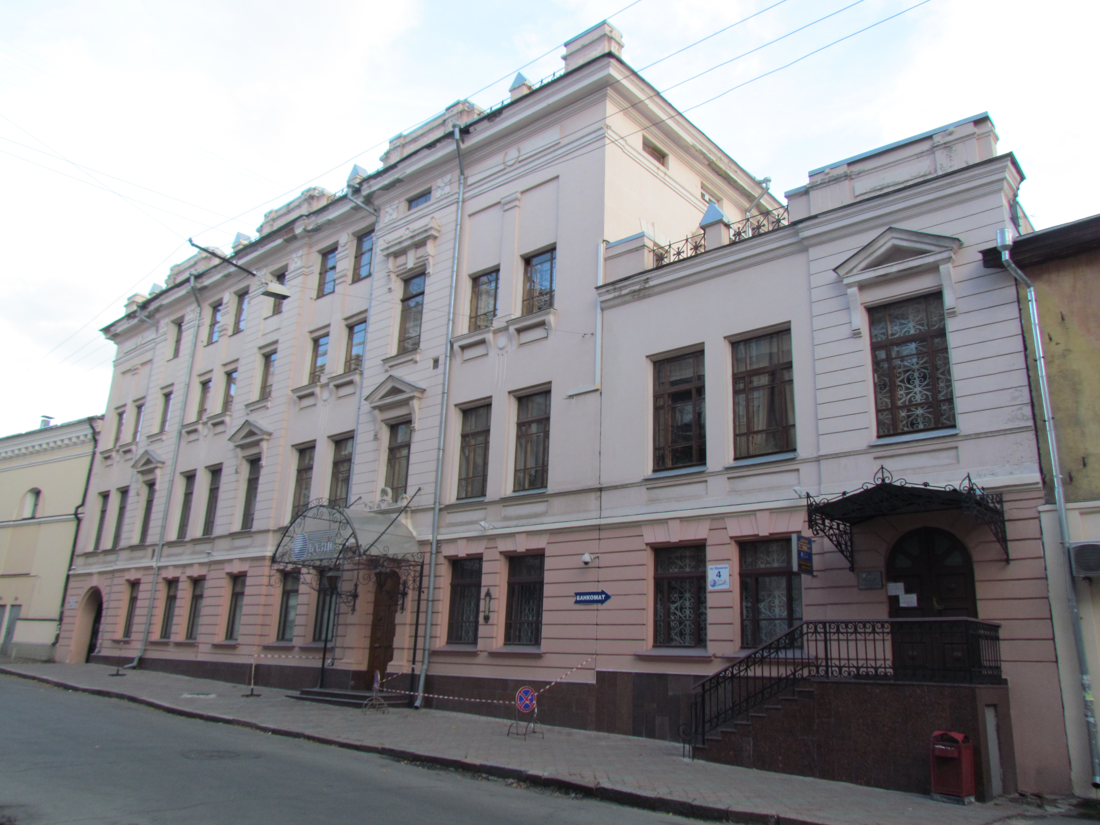 Україна, Харків, пр. Мар'яненко, 4